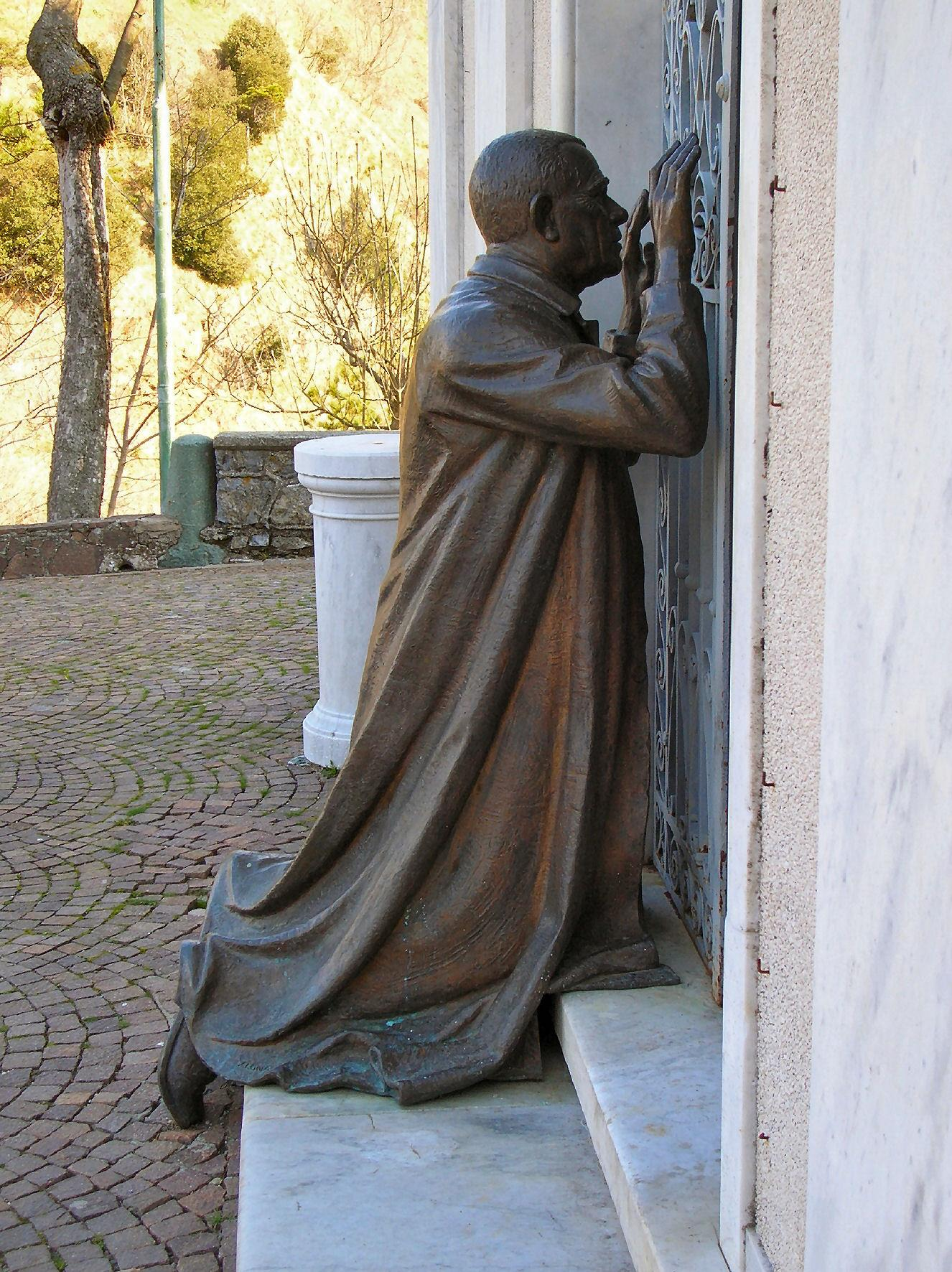 Foto di proprietà Statua Don Orione (Santuario N.S. Guardia - Ceranesi)